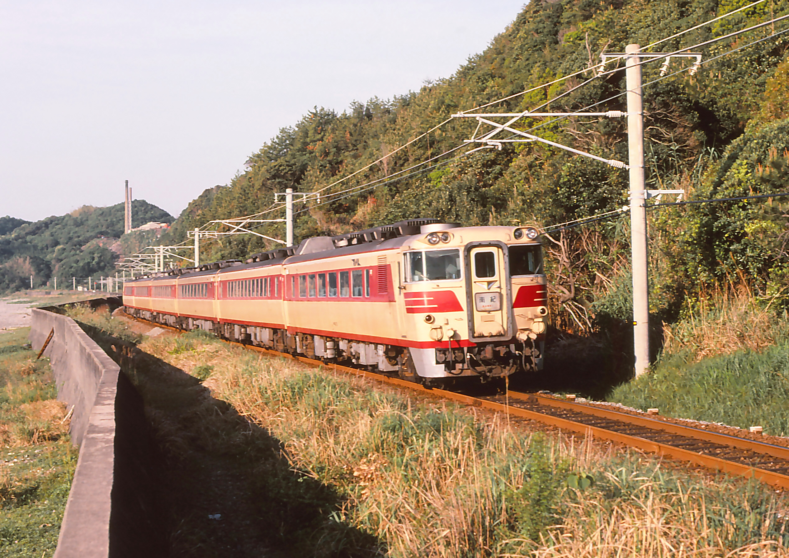 キハ82系 南紀 和歌山県新宮市